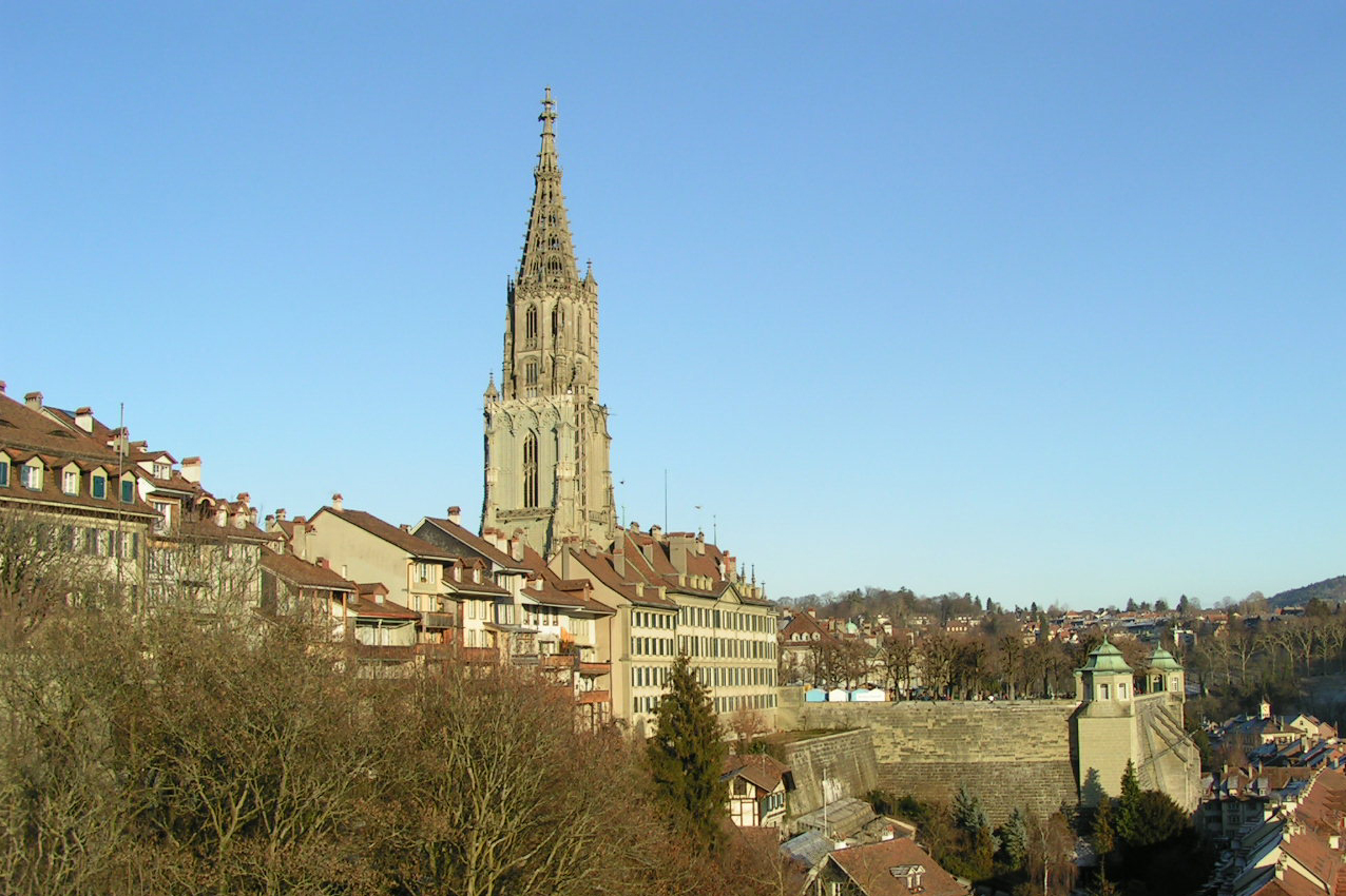 Münster of Berne, Switzerland